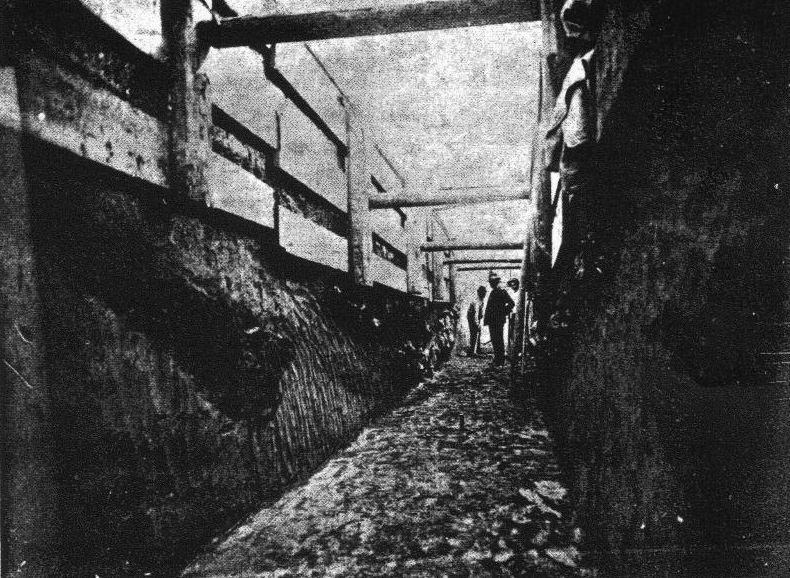 Die Spitzgräben vom Kastell Ala Nova, Österreich.